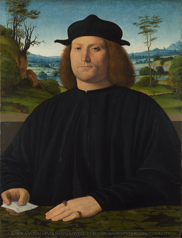 Giovanni Cristoforo Longoni